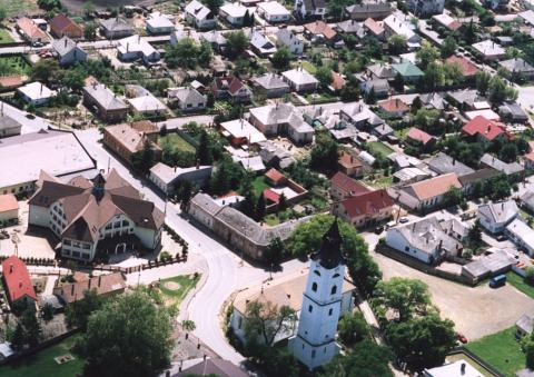 Nagykálló, Hungary, aerial photography